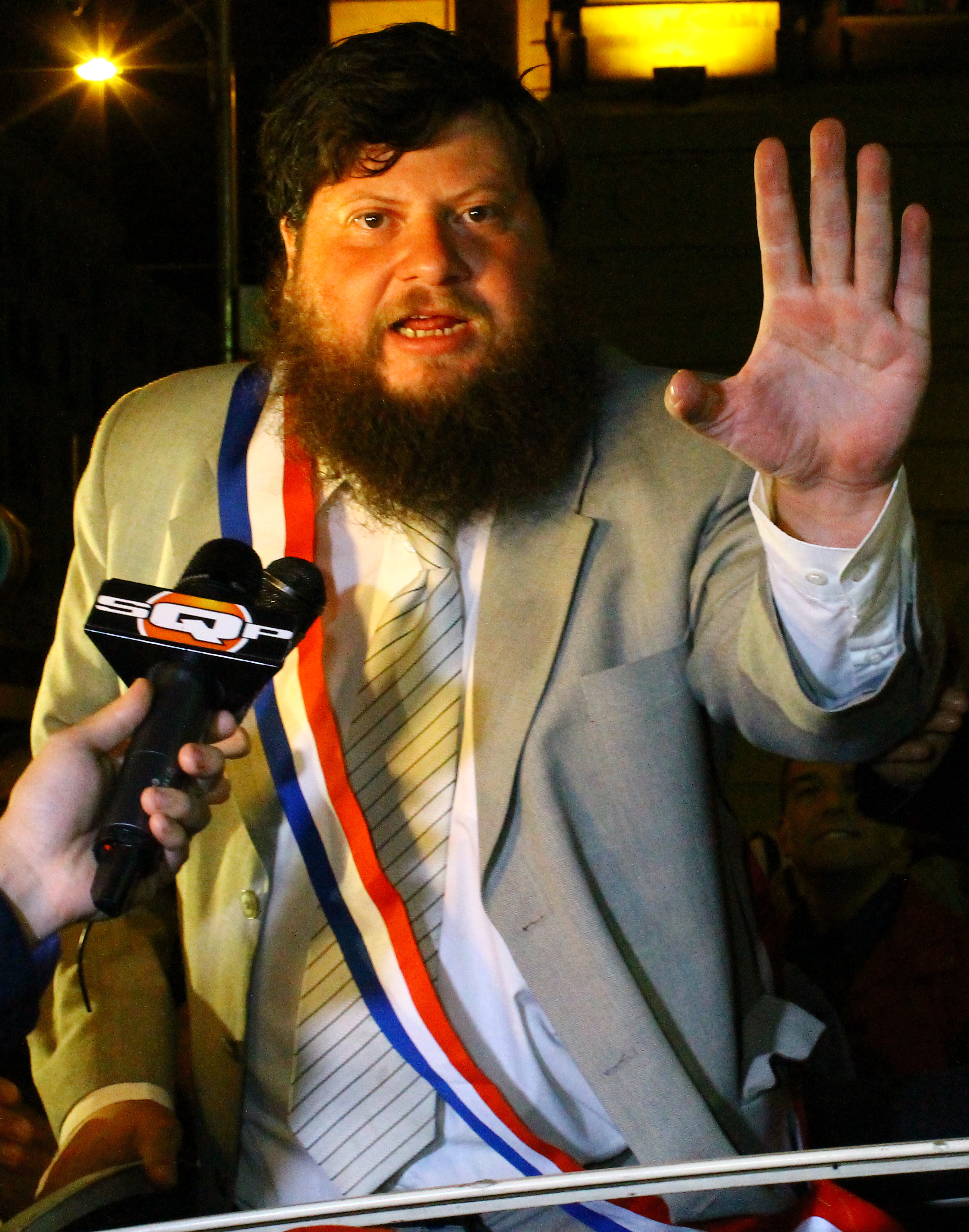 Rodrigo Salinas (Chile, 2 de febrero de 1975), también conocido como el "Guatón Salinas", es un dibujante y comediante chileno, conocido por ser uno de los fundadores del colectivo de arte La Nueva Gráfica Chilena, guionista y realizador del programa infantil 31 minutos y formar parte del elenco del espacio de humor El club de la comedia, fue elegido rey guachaca 2012 en la tradicional fiesta chilena.